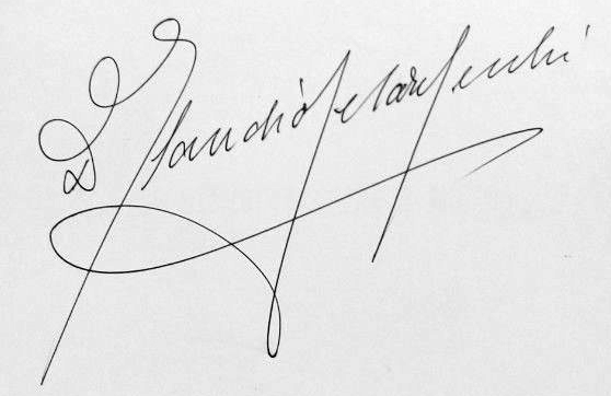 Claudio Cesare Secchi's signature.